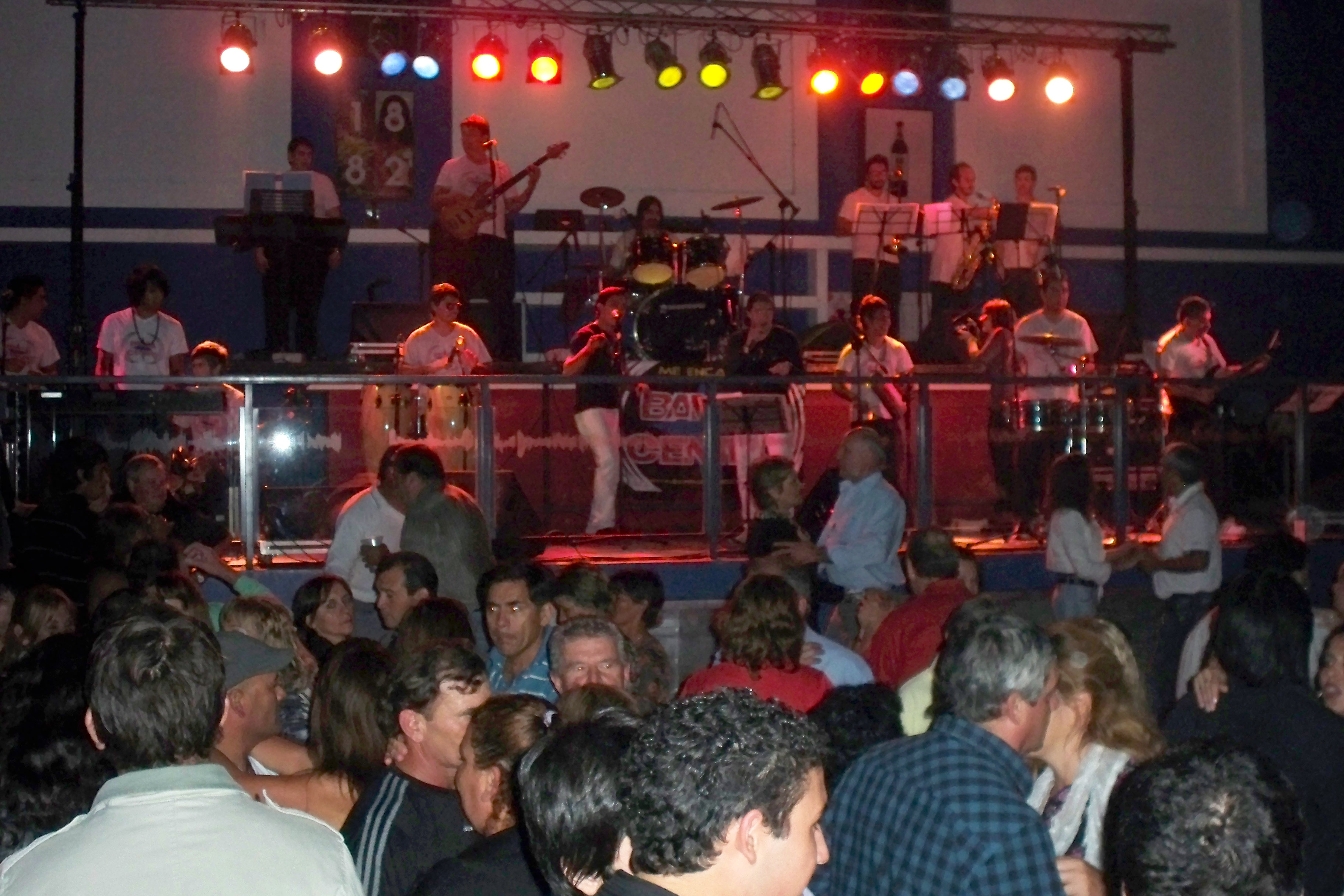 Banda Centro, la banda de cuarteto del centro de argentina.